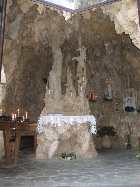 Grotta rappresentando la Madonna di Lourdes fatta costruire da Giacinto Bianchi a Pigna